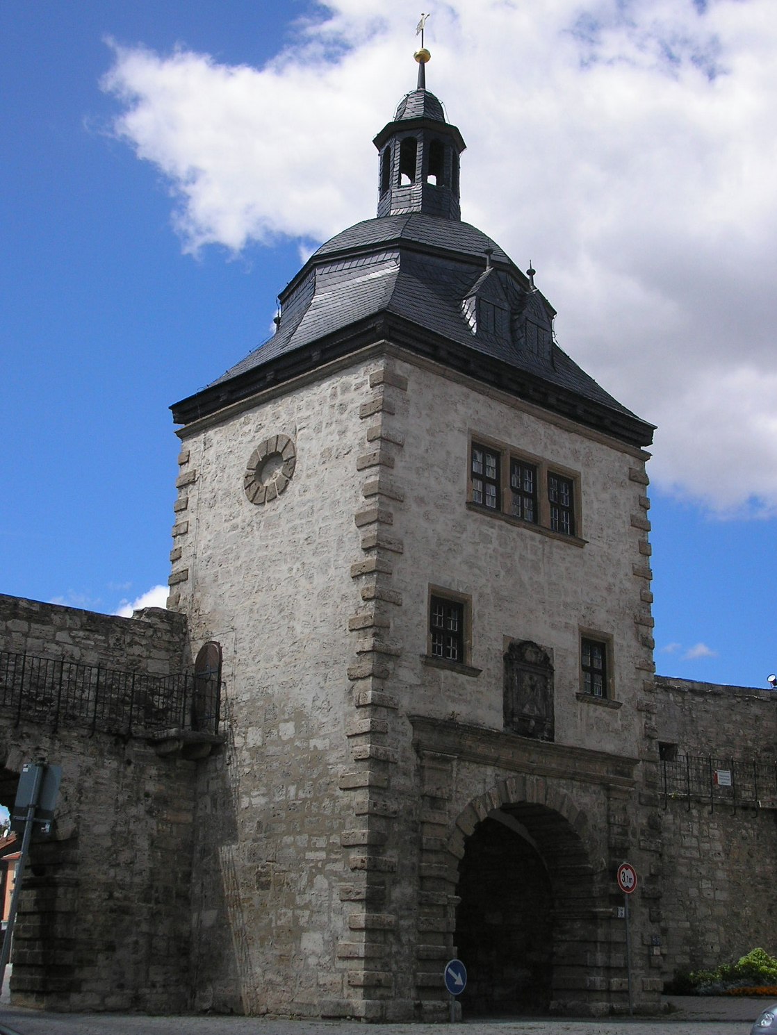 Das Frauentor in Mühlhausen (Thüringen).